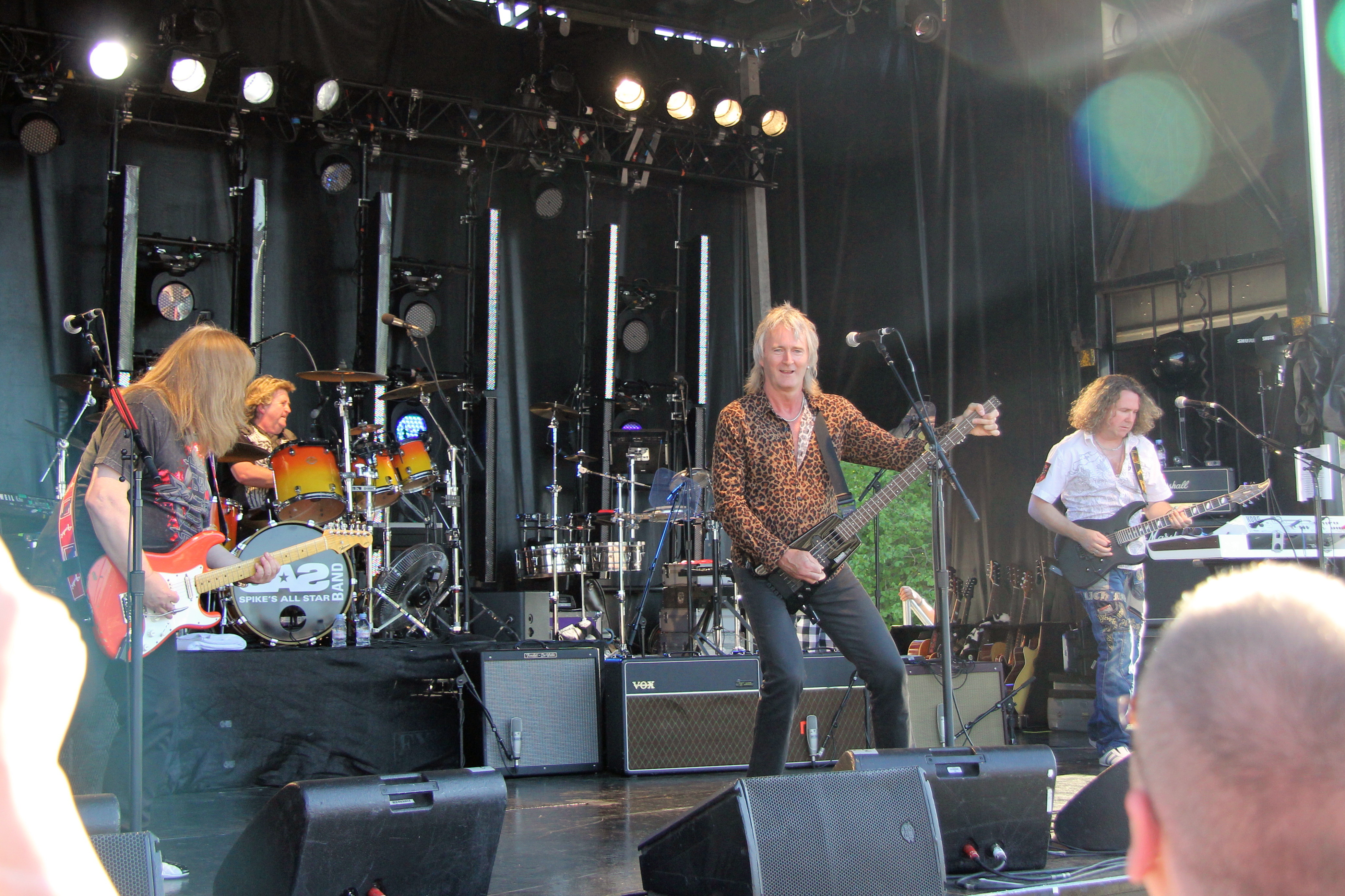 Sweet_1224